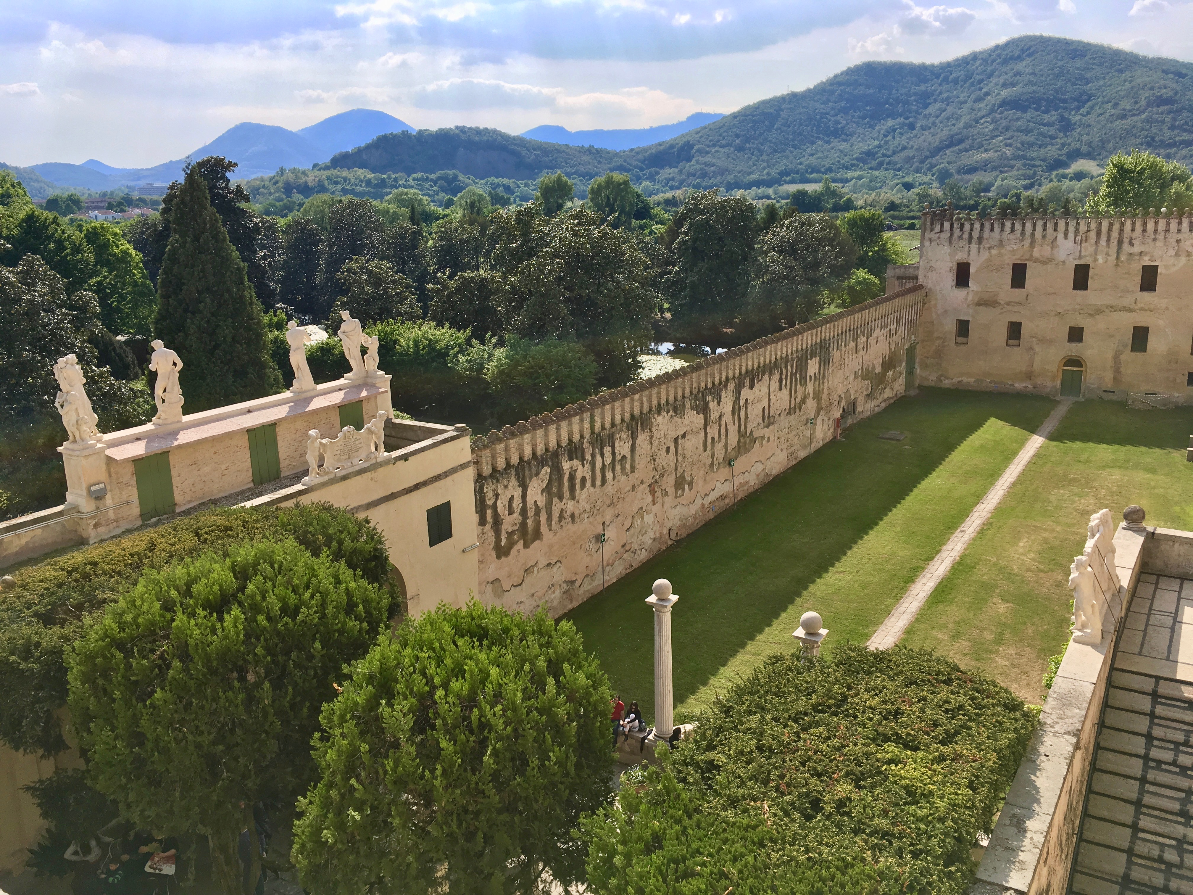 Castello del Catajo, Battaglia Terme (Padova).